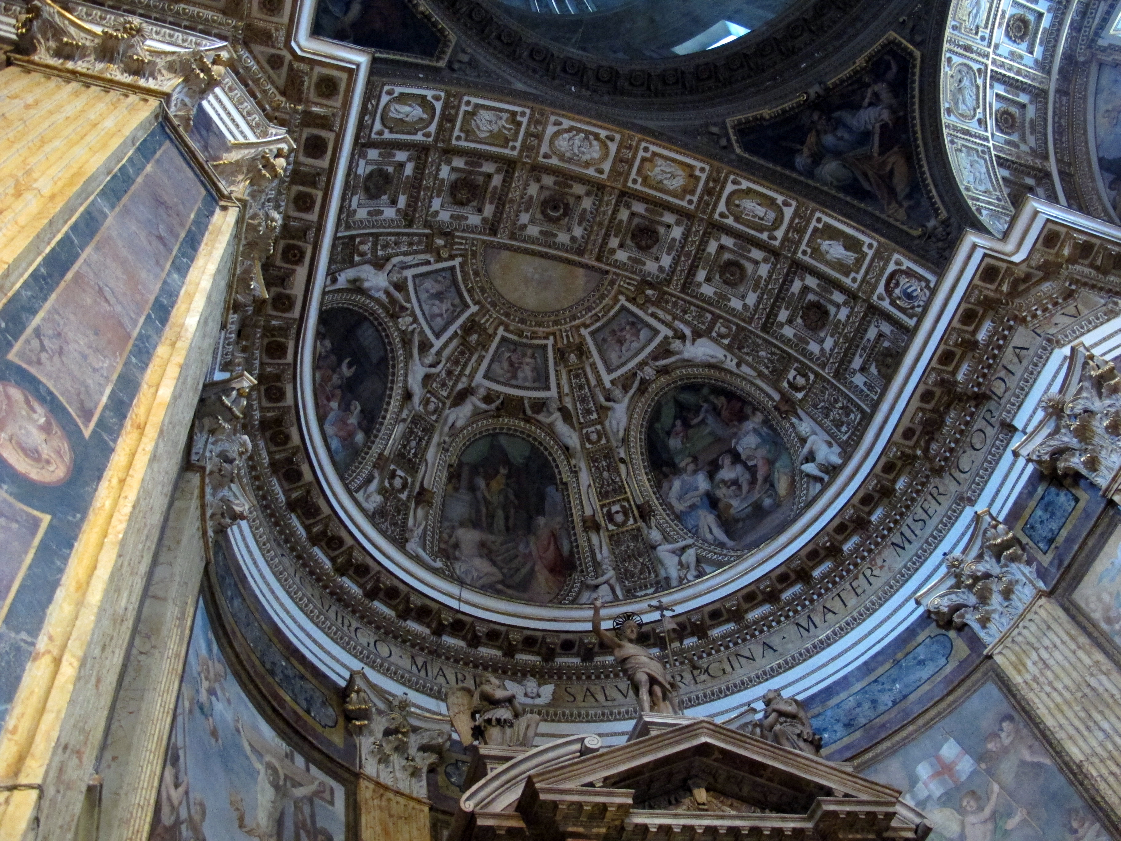 Roma, vedi titoli